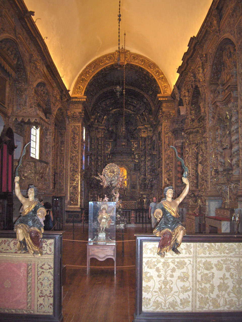 Baroque chapel with an extravaganza of talha dourada; Museu da Reinha D. Leonor; Beja, Portugal